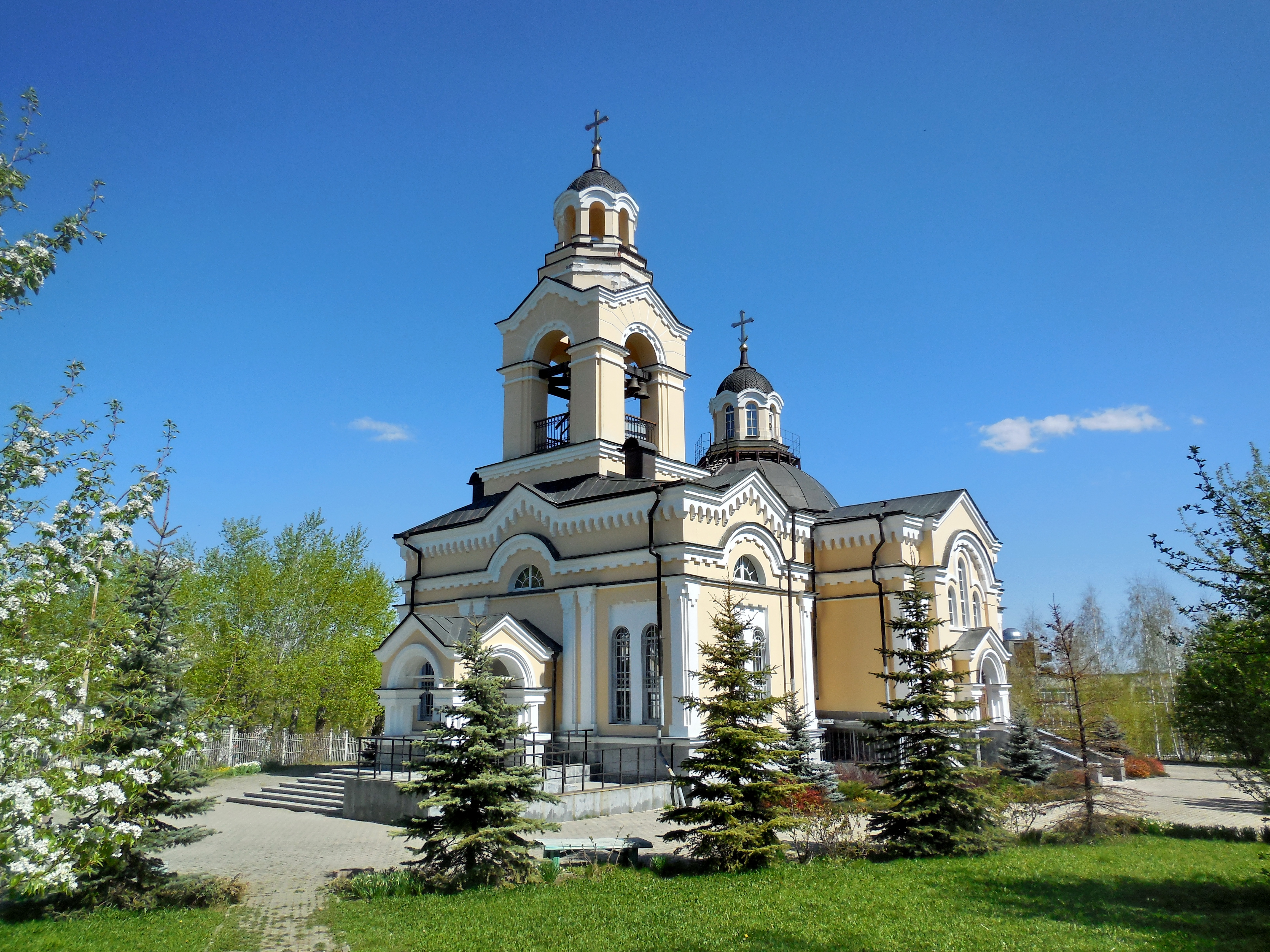 Кировград